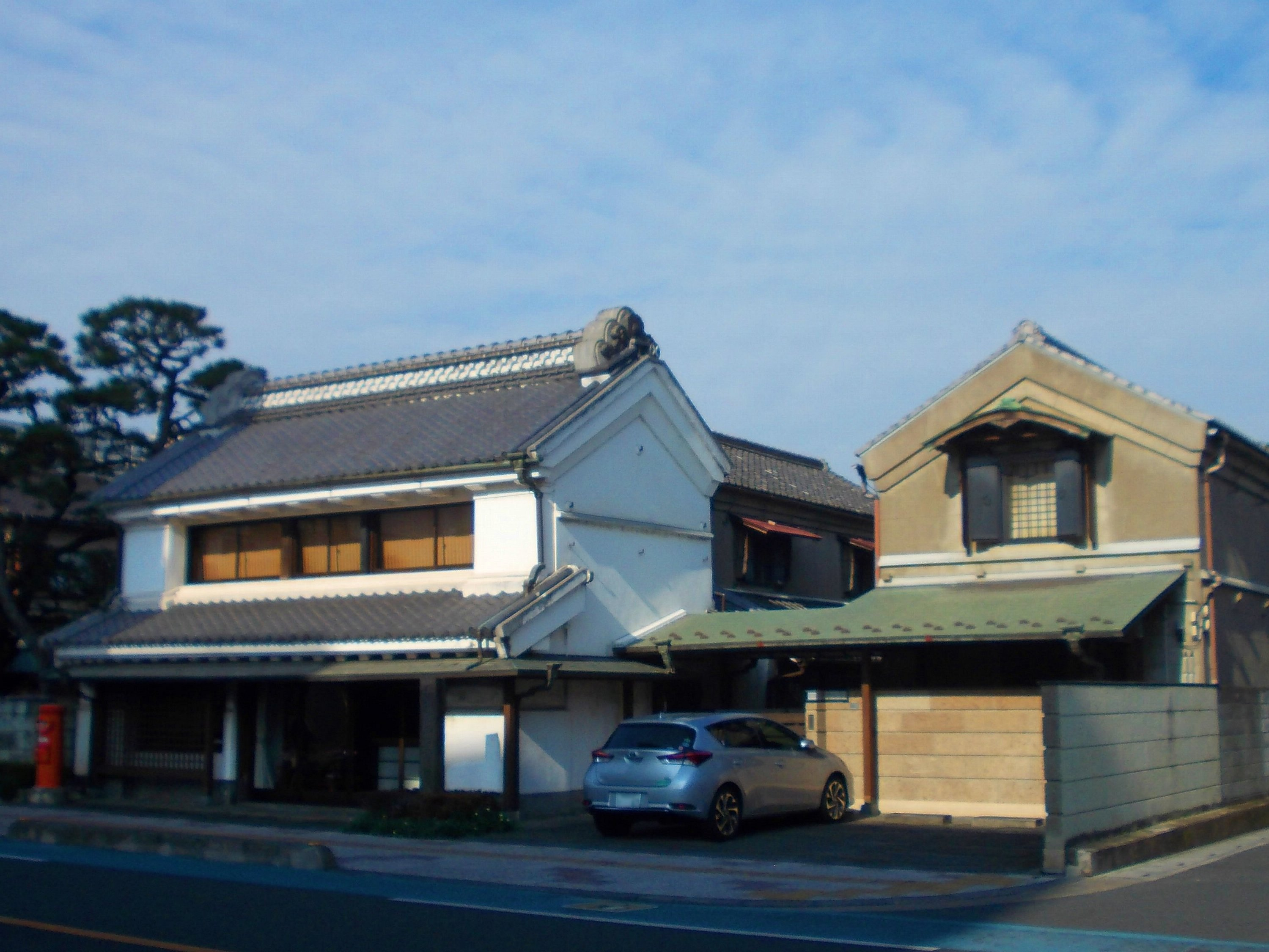 粕壁最大の大地主・田村新蔵邸